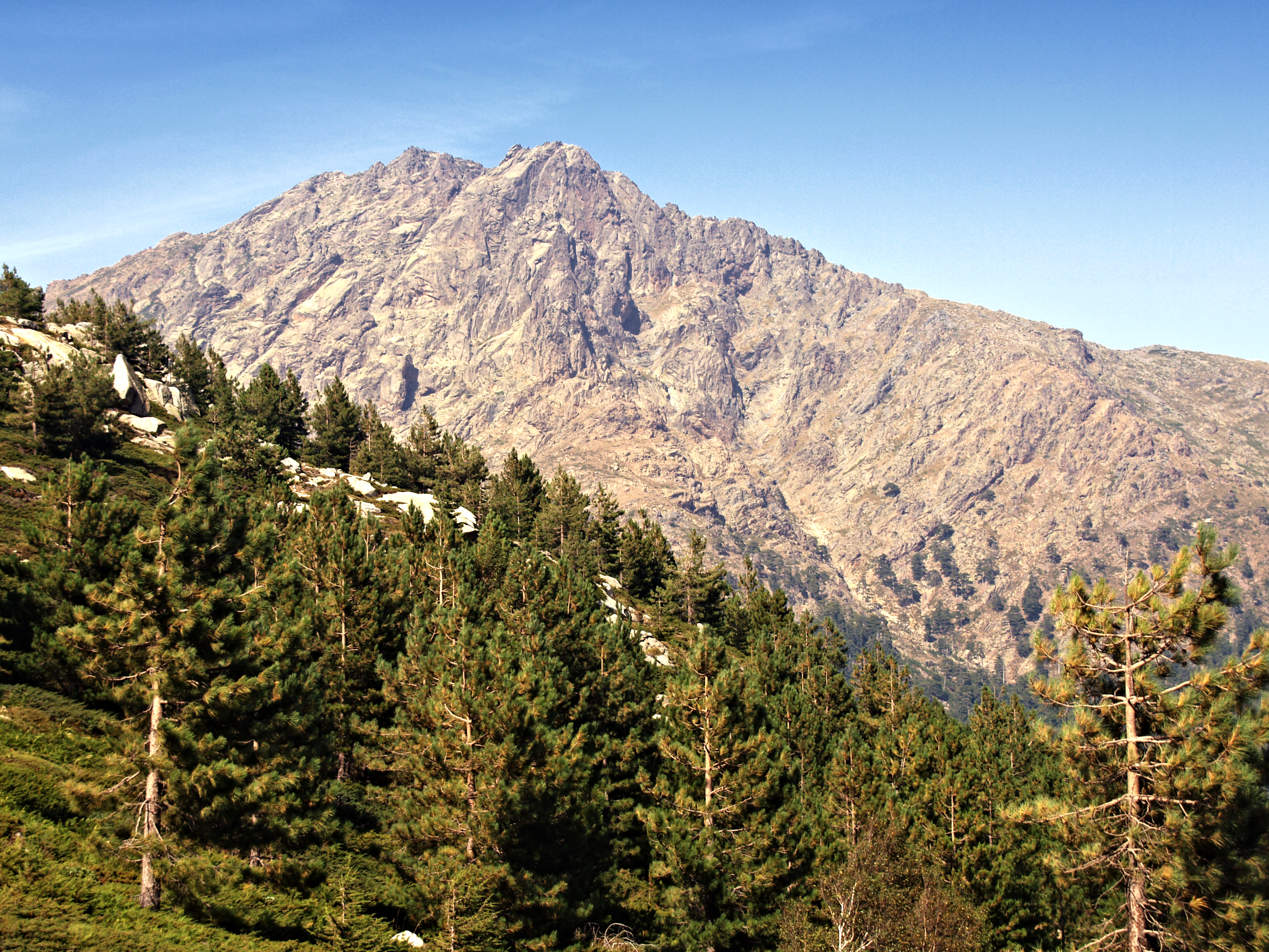 Albertacce (Corsica) - Punta Licciola (2 235 m) et Punta di Castelluccia (2 188 m) vues depuis le col de Vergio